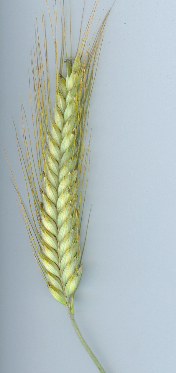 Roggen aus Deutschland